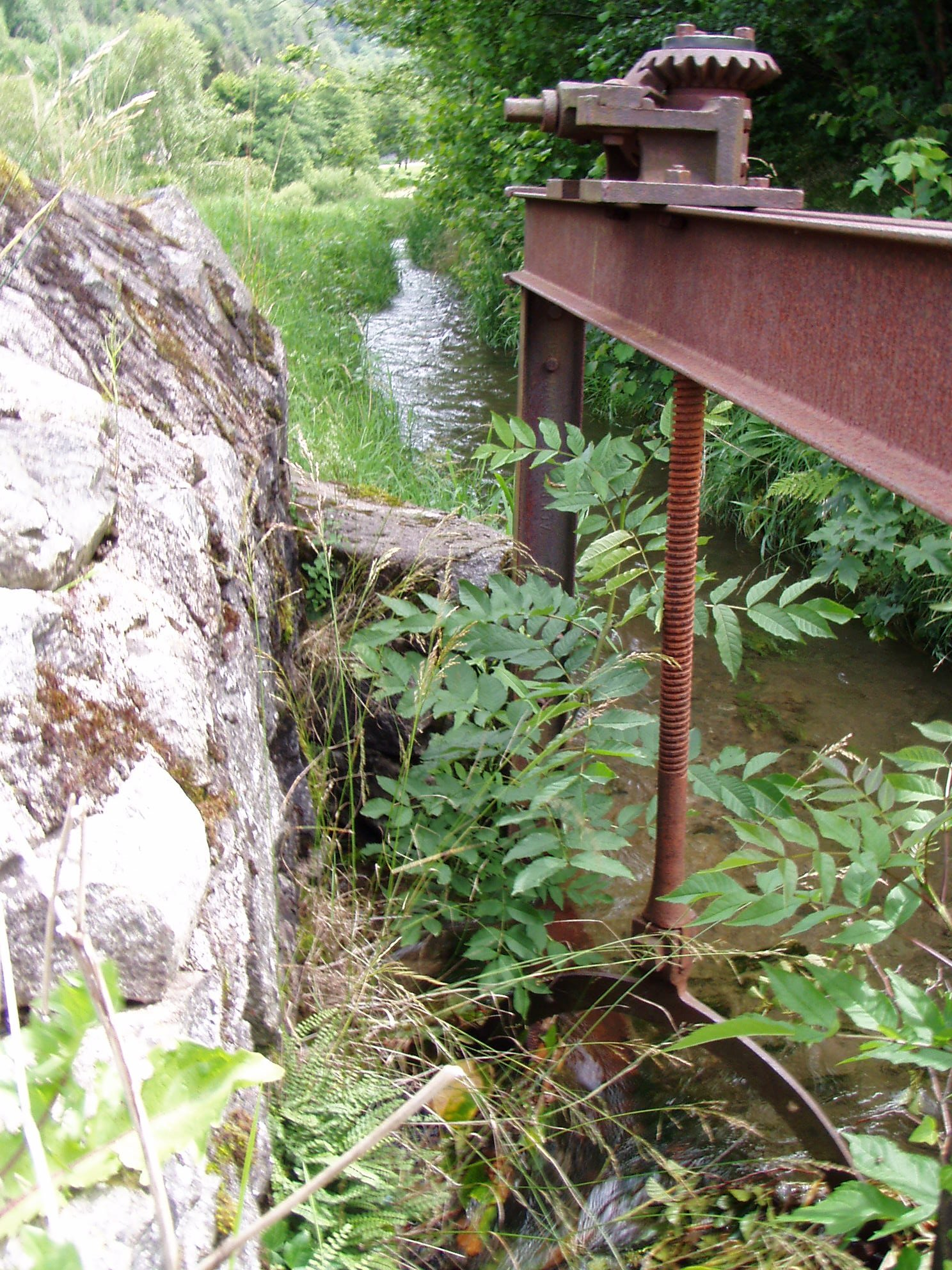 Le Séchenat qui se jette dans l'étang à Bussang-les-Sources, à proximité de la source de la Moselle